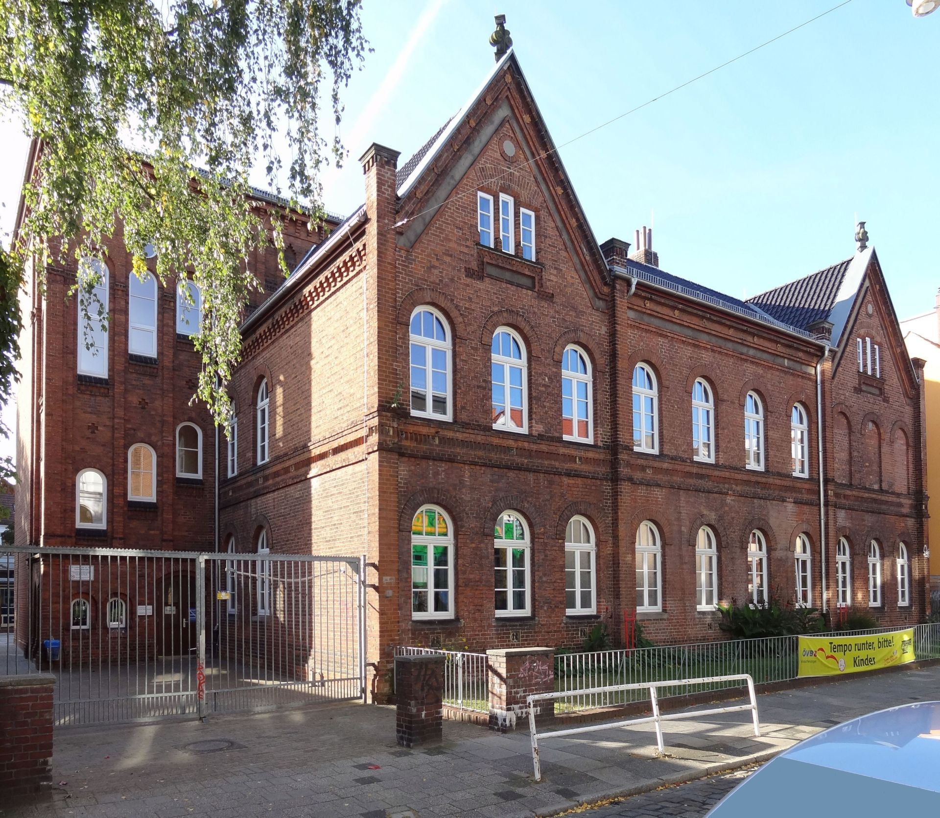 Freischule Schmidtstraße, St. Nicolai-Witwenhaus in Bremen, Schmidtstraße 9Die Gesamtanlage ist ein geschütztes Kulturdenkmal in der Freien Hansestadt Bremen, mit der Nr. 1107 beim Landesamt für Denkmalpflege registriert.